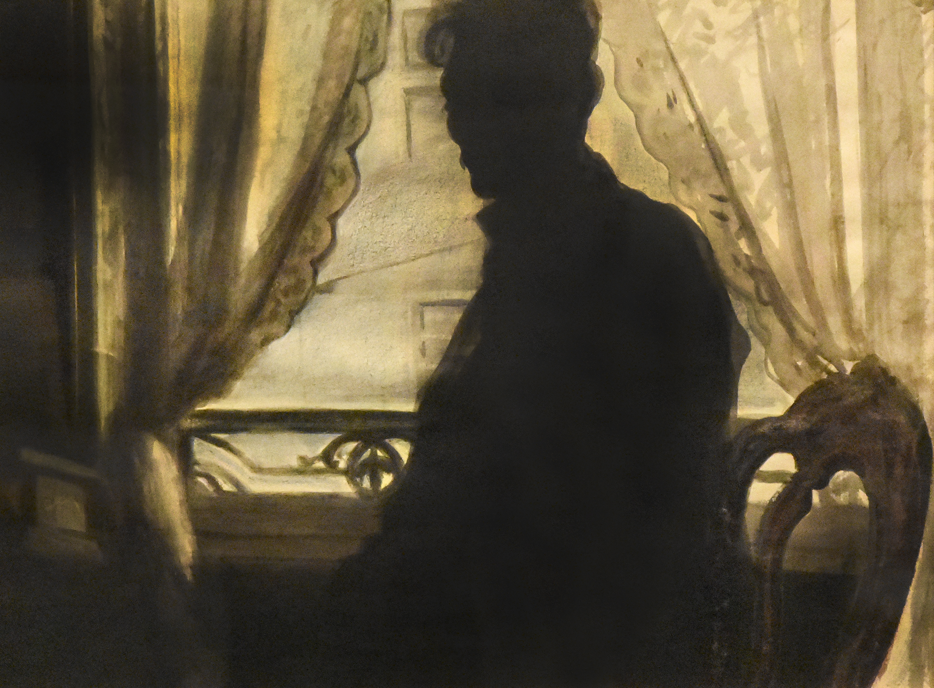 Léon Spilliaert (1881-1946) Silhouet van de schilder (1907) MSK Gent